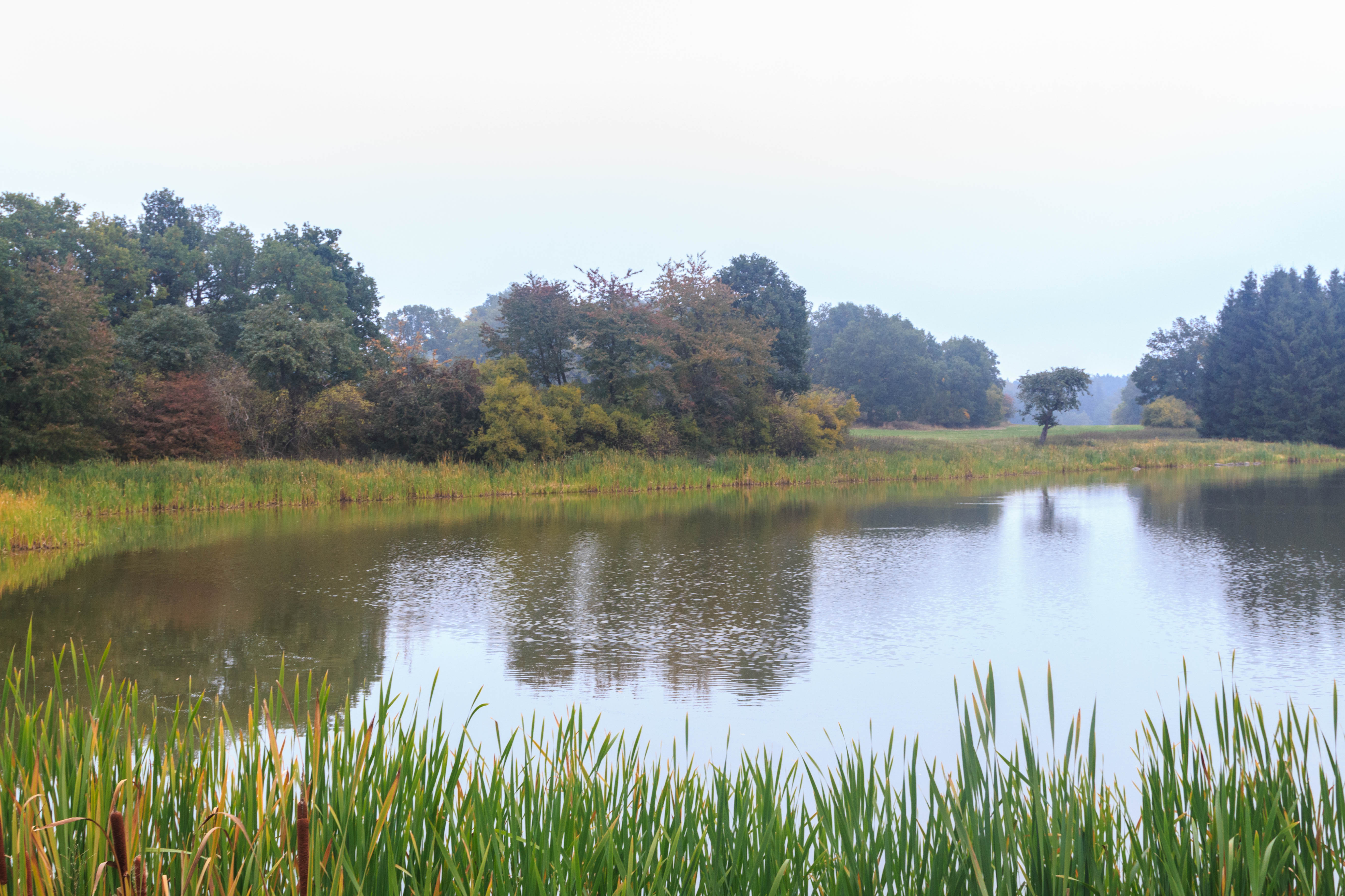 Project: Vodstvo.